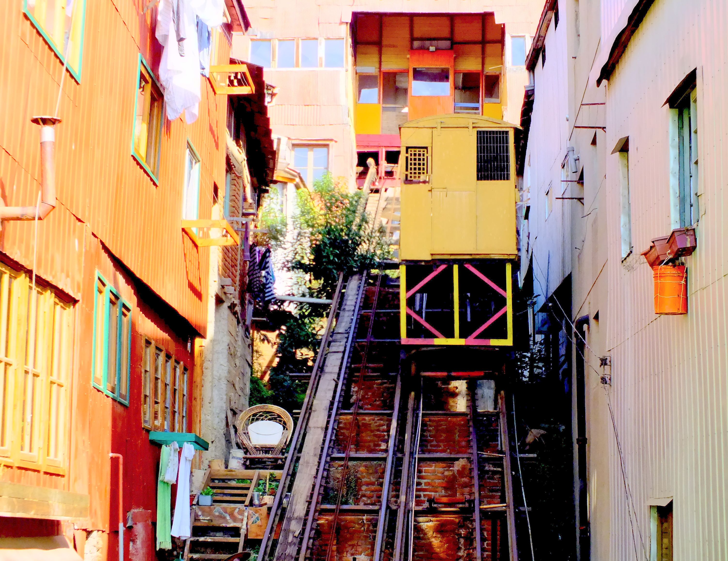 Ascensor Mariposa. This is a photo of a national monument in Chile: 771